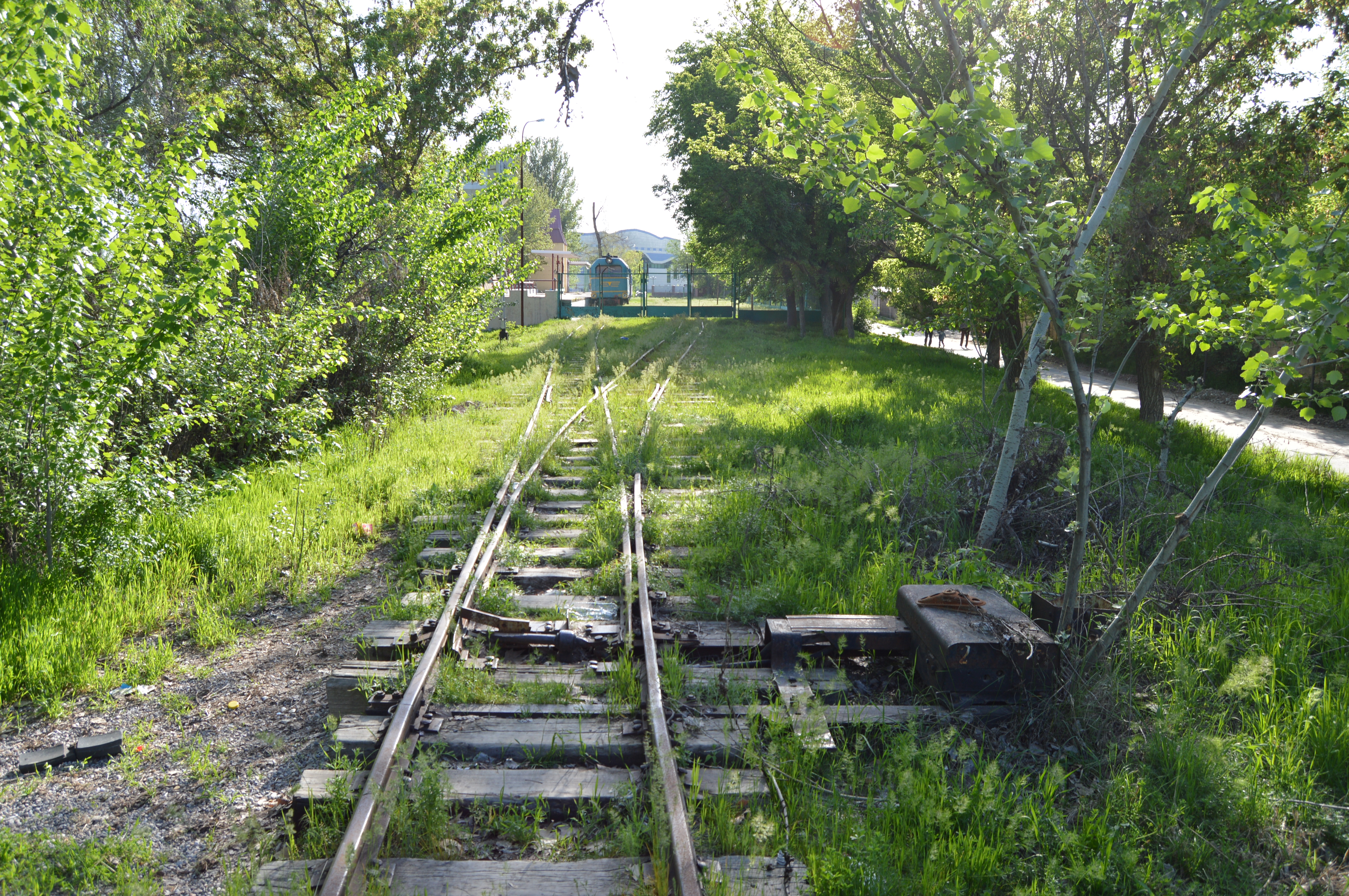 Станция Спортивная на ДЖД в Шымкенте,Казахстан